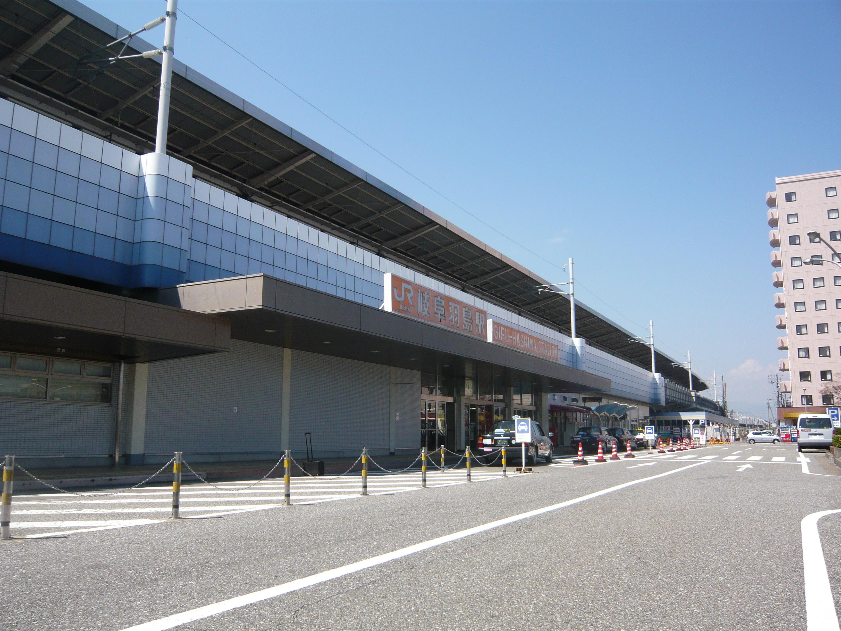 Gifu Hashima Station（岐阜羽島駅）,Hashima,Gifu,Japan（岐阜県羽島市）で撮影。